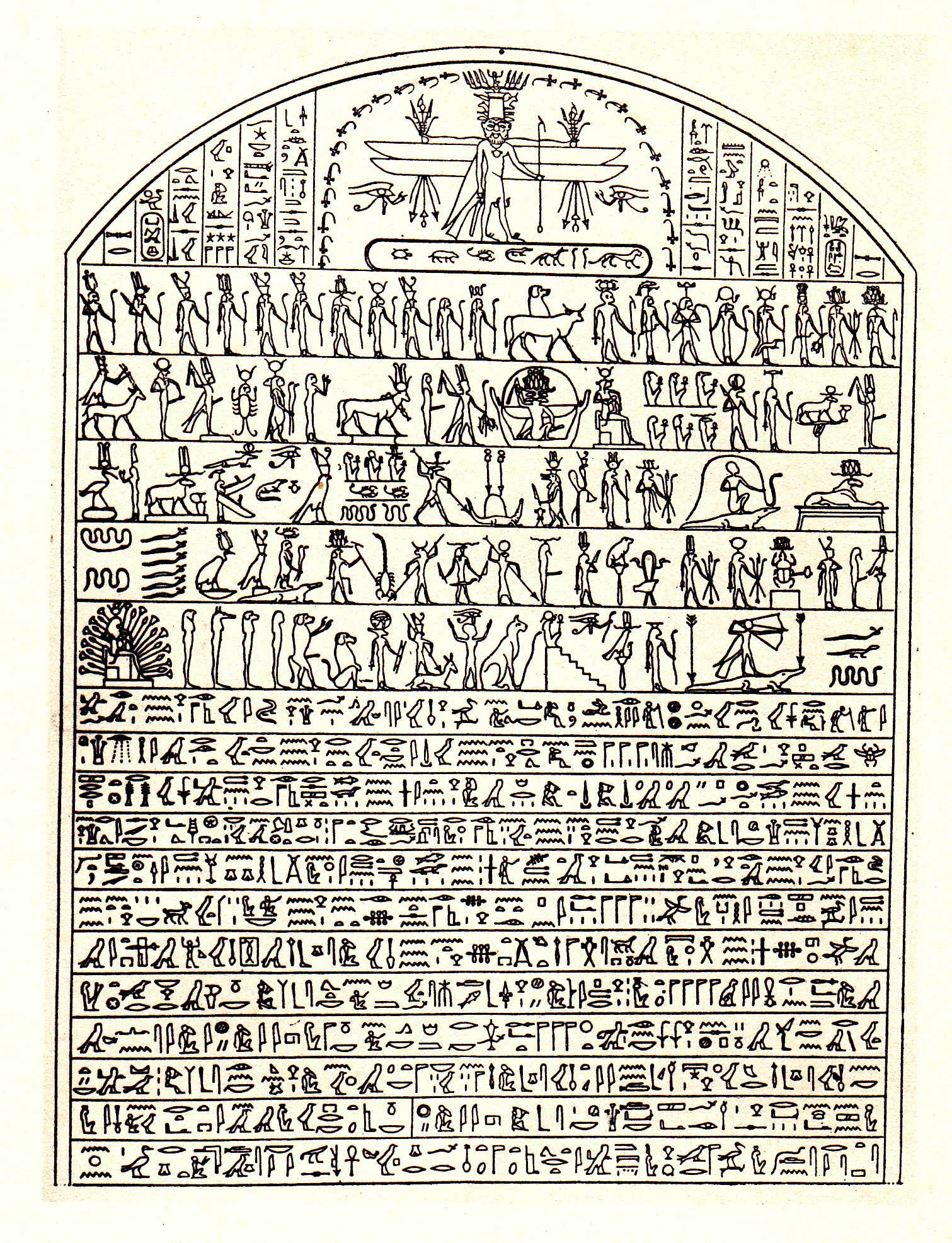 partie supérieure du verso de la Stèle de Metternich